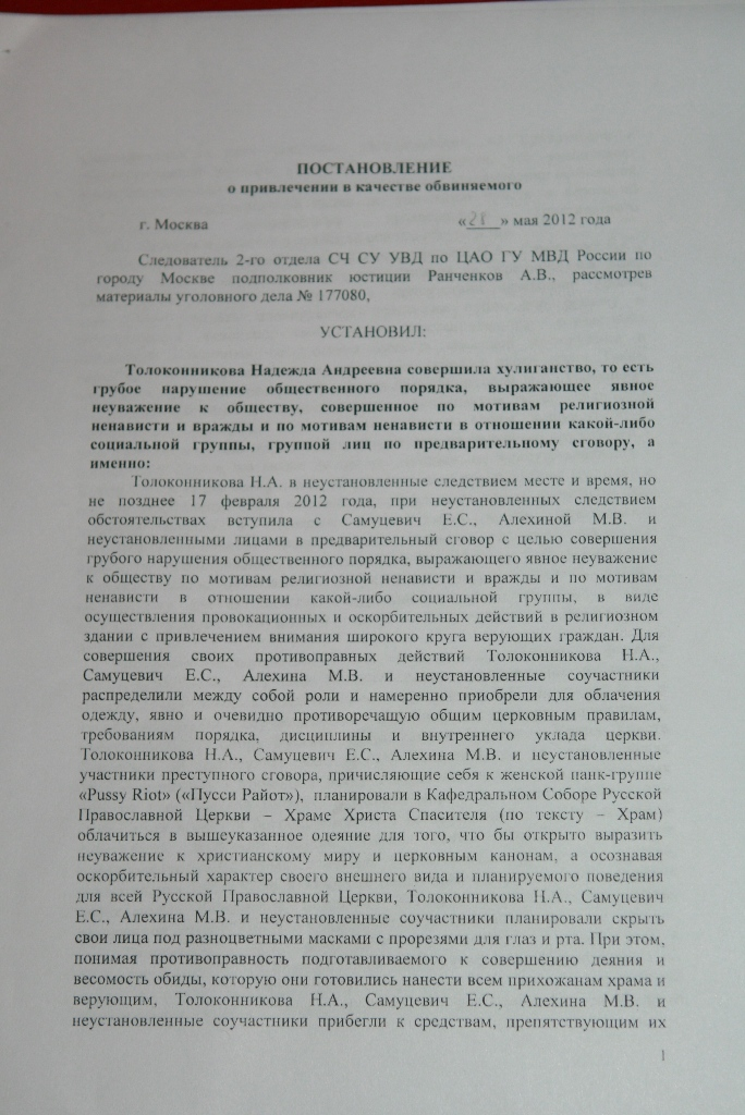 Постановление о привлечении Толоконниковой Н. А. в качестве обвиняемой в хулиганстве по делу о «панк-молебне» группы «Pussy Riot» в Храме Христа Спасителя. Страница 1.